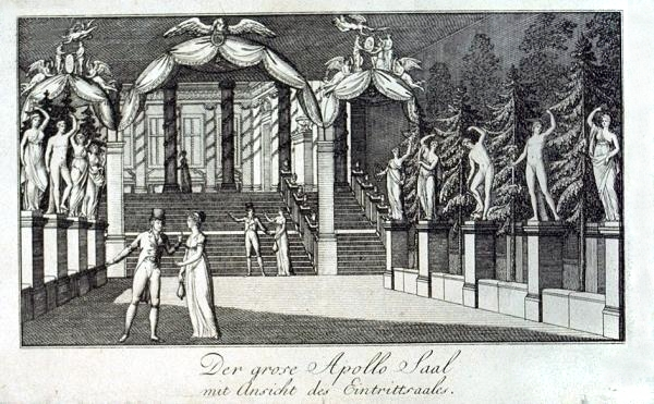 Stich des Eintrittsaals des großen Apollosaals, ein großartig angelegtes Vergnügungsetablissement am Schottenfeld, Zieglergasse 15 im 7. Bezirk von Wien, das bis 1839 einer der berühmtesten Ballveranstaltungsorte war.